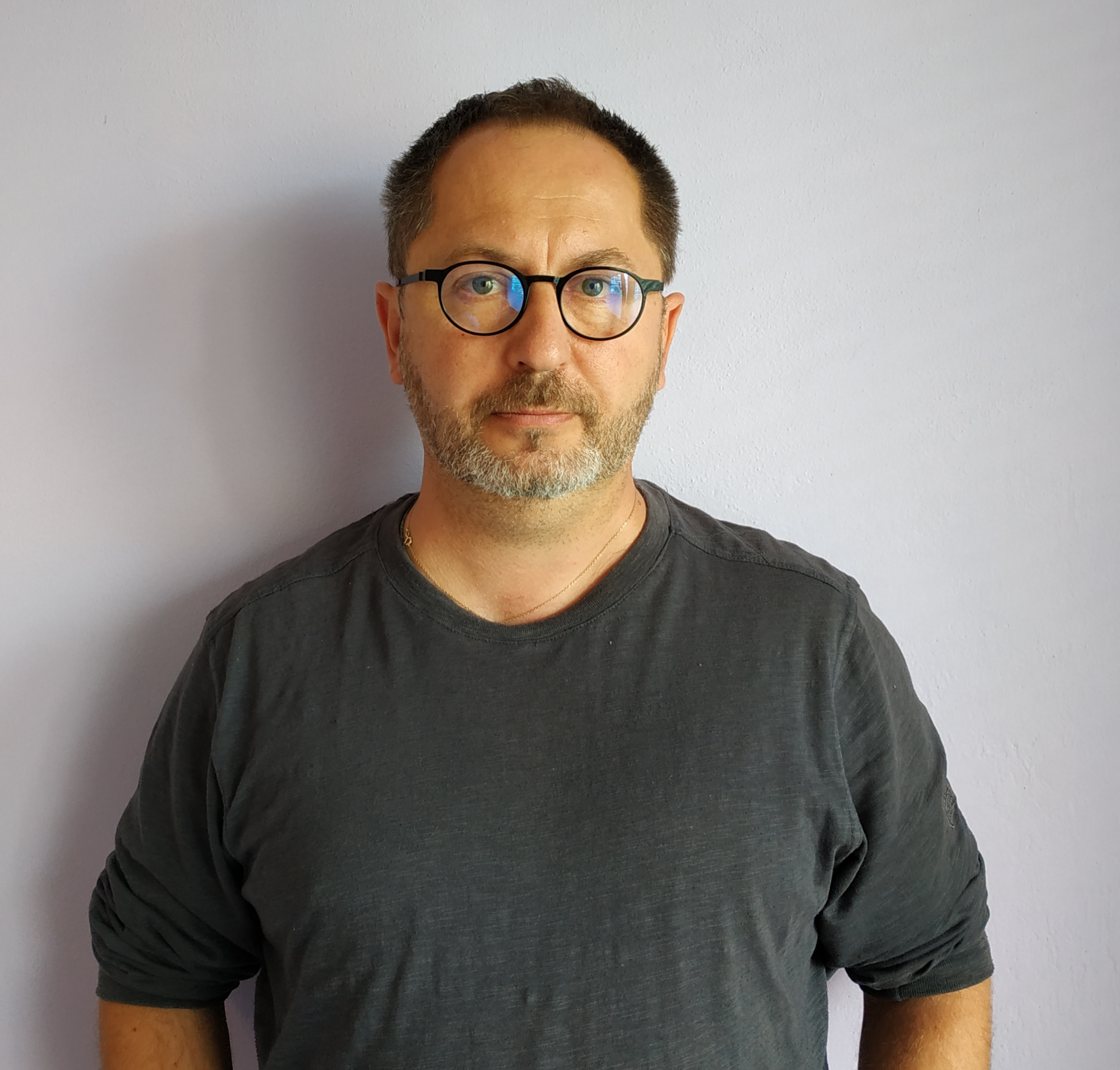 Per Kukal